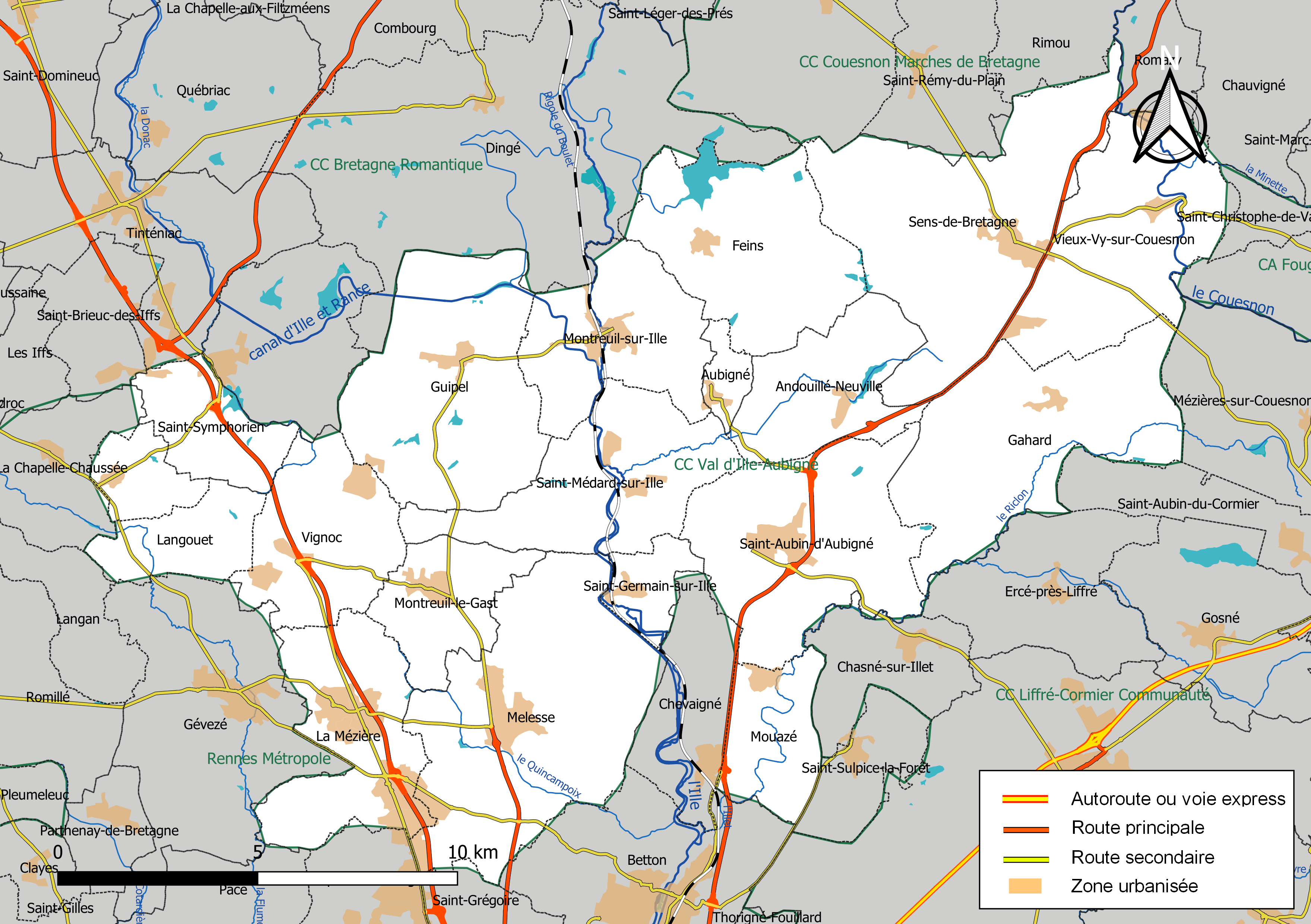 Carte géographique de la Communauté de communes Val d'Ille-Aubigné, département d'Ille-et-Vilaine, France. Composition au 1er janvier 2019.